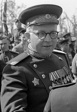 Котиков Александр Георгиевич. Комендант советского сектора Берлина (1946—1950).